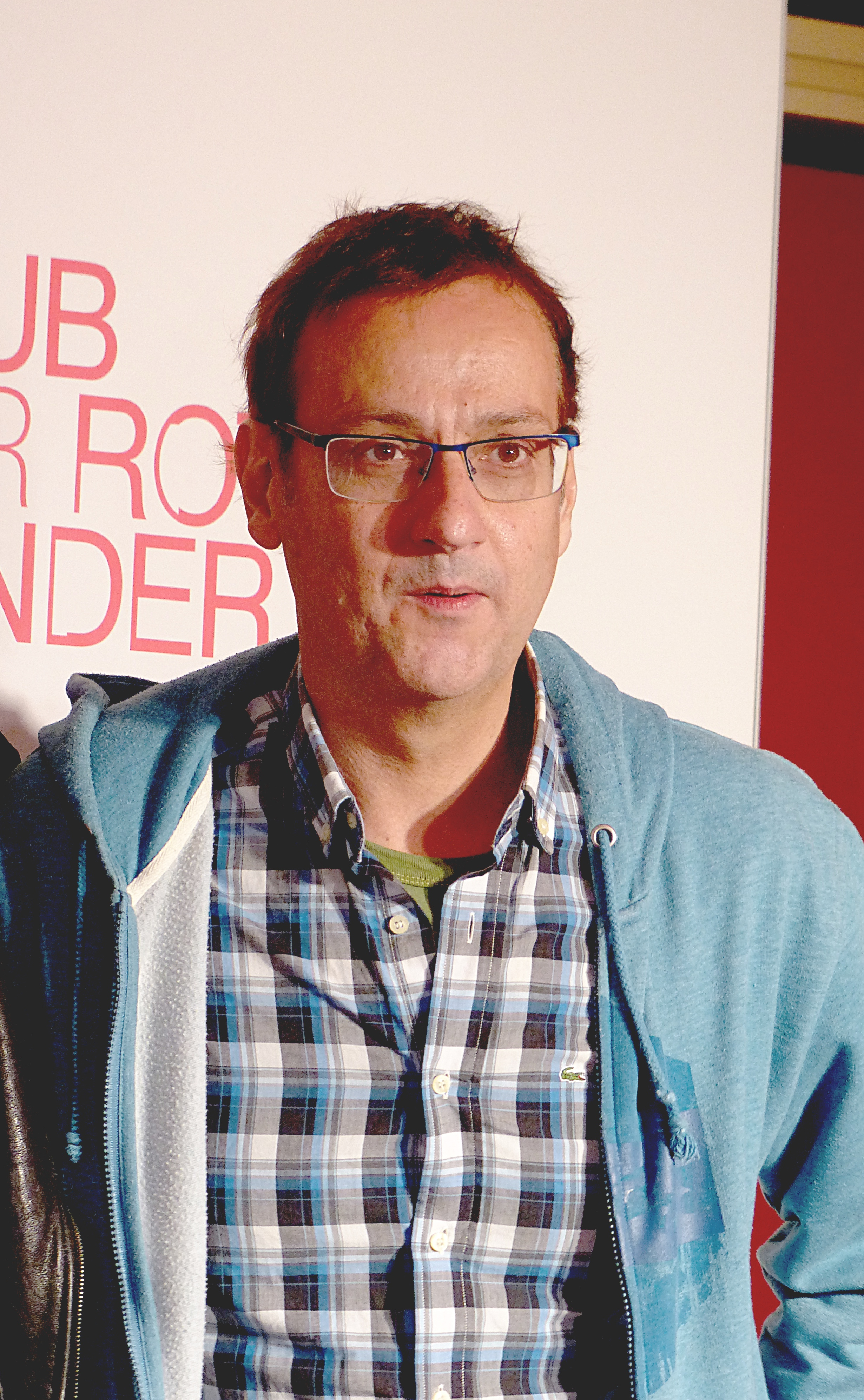 Albert Espinosa bei der Preview der 2. Staffel "Club der roten Bänder", Oktober 2016.